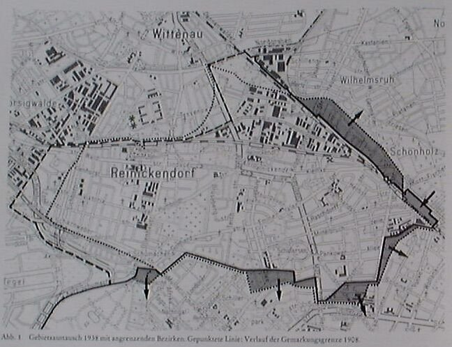 Berlin-Wilhelmsruh: Gebietstausch 1938 übernommen von [1], Genehmigung des Autors zur Nutzung als Public Domain liegt mir (Mazbln) vor